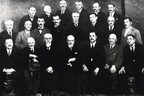 УВУ в Празі, 1941 р.: (Перший ряд зліва) О. Лотоцький, О. Одарченко, І. Горбачевський, О.Колесса, С. Шелухин, О. Ейхельман, Ф. Щербина, (Другий ряд зліва) Д. Антонович, С. Дністрянський, Б. Матюшенко, О. Шульгин, Ф. Швець, В. Тимошенко, А. Артимович, К. Лоський, (Третій ряд зліва) В. Біднов, С. Бородаєвський, А. Яковлів, П. Андрієвський, В. Щербаківський, Ф. Слюсаренко